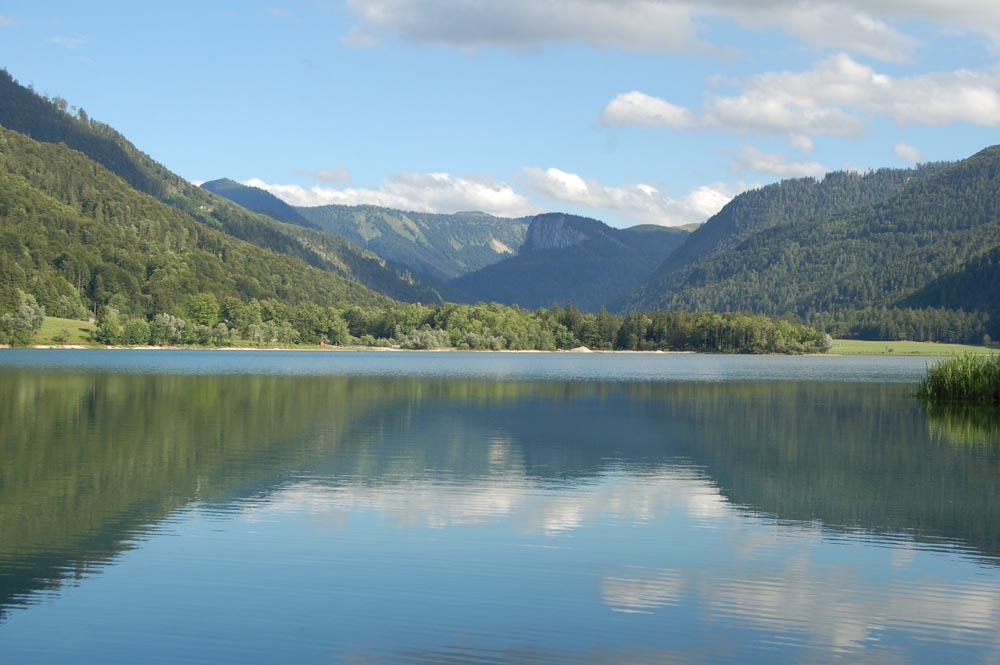 Hintersee, vom Nordufer nach Süden, Richtung Osterhorngruppe